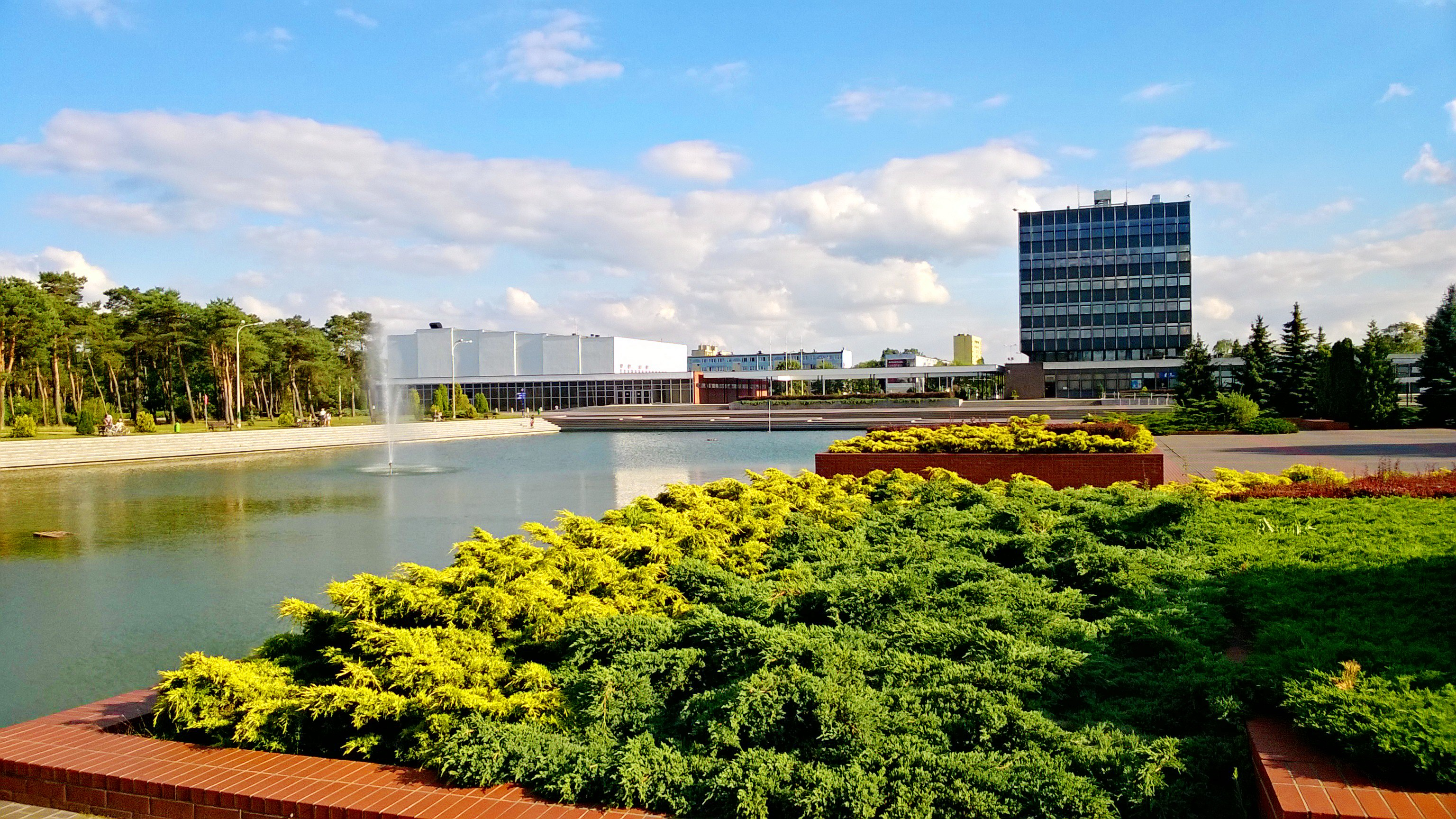 Miasteczko Uniwersyteckie w Toruniu